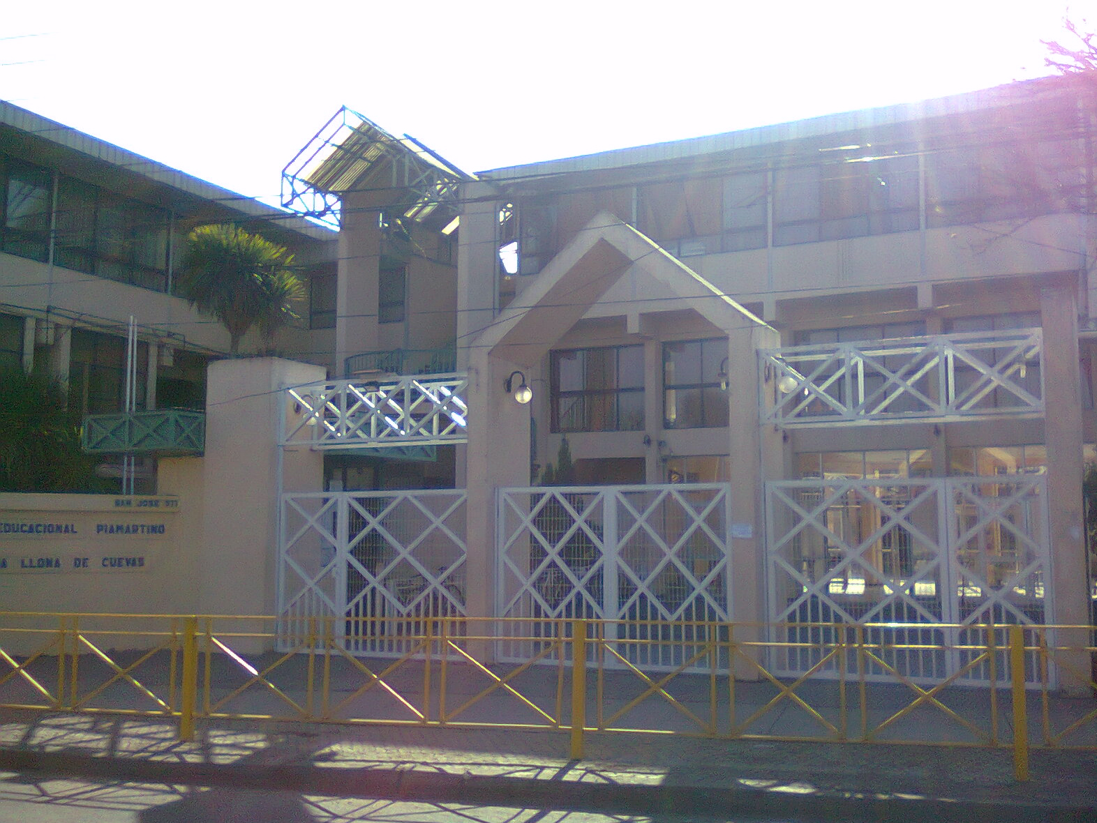 La entrada principal del Centro Educacional Piamartino Carolina Llona de Cuevas, colegio particular subvencionado ubicado en San José 577, Maipú, Santiago de Chile. Manejado por la Congregación Piamarta.